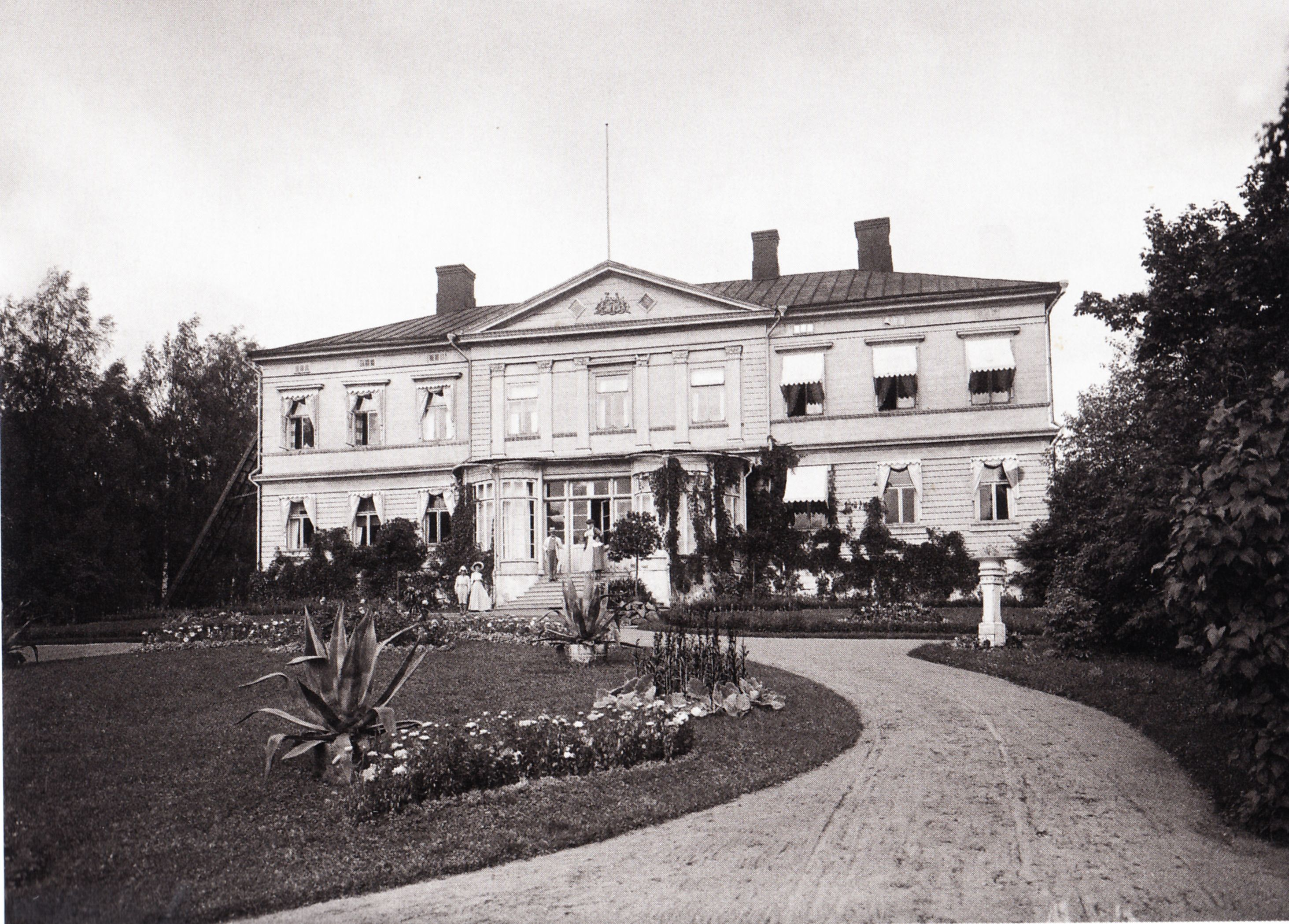 Sannäsin kartano